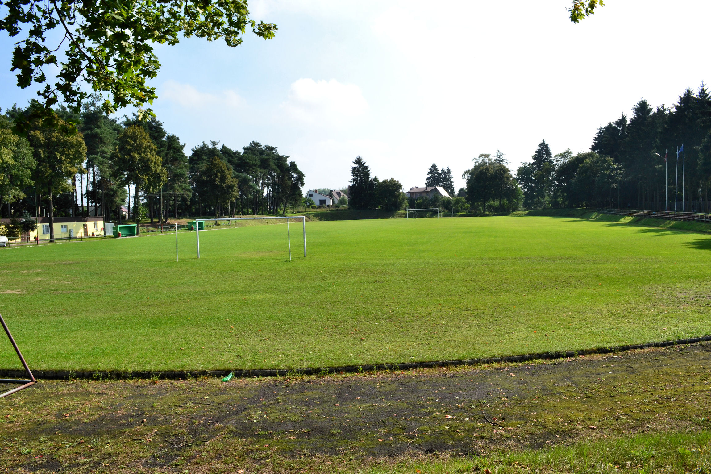 Chociwel